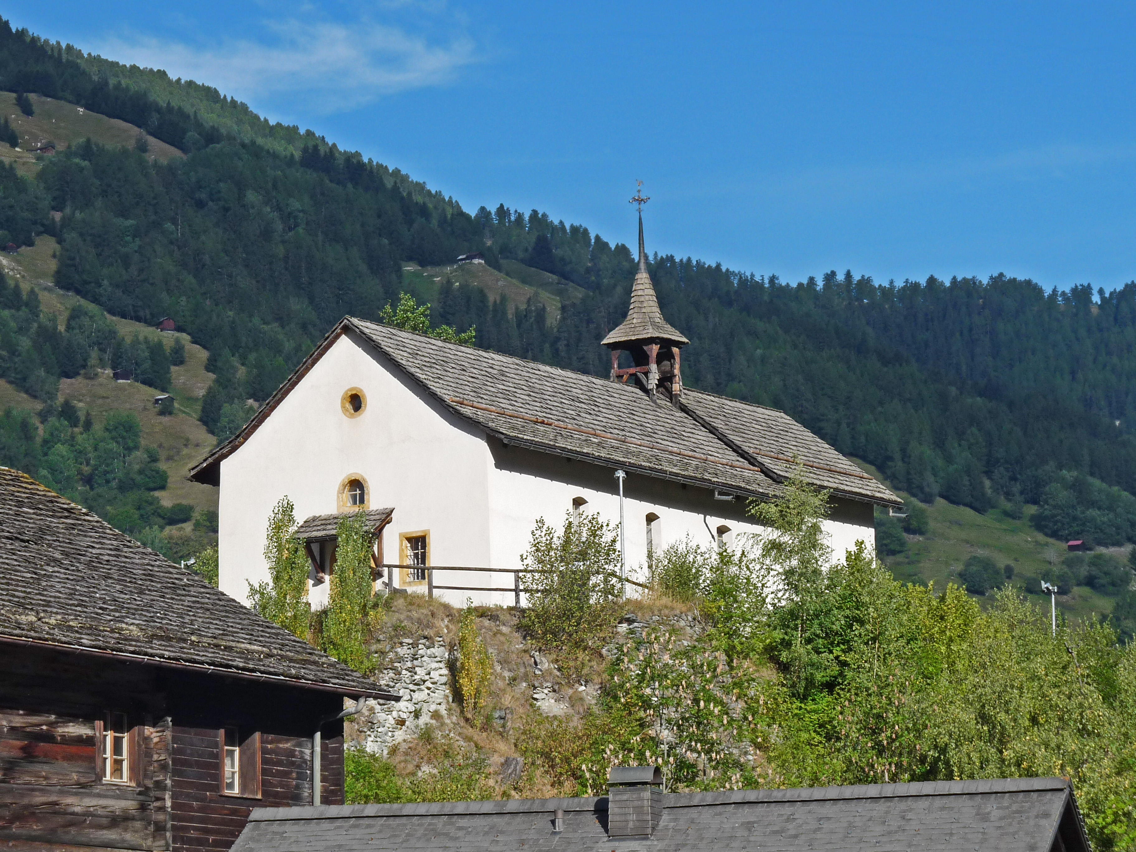 Chapelle de Vissoie (Valais, Suisse)